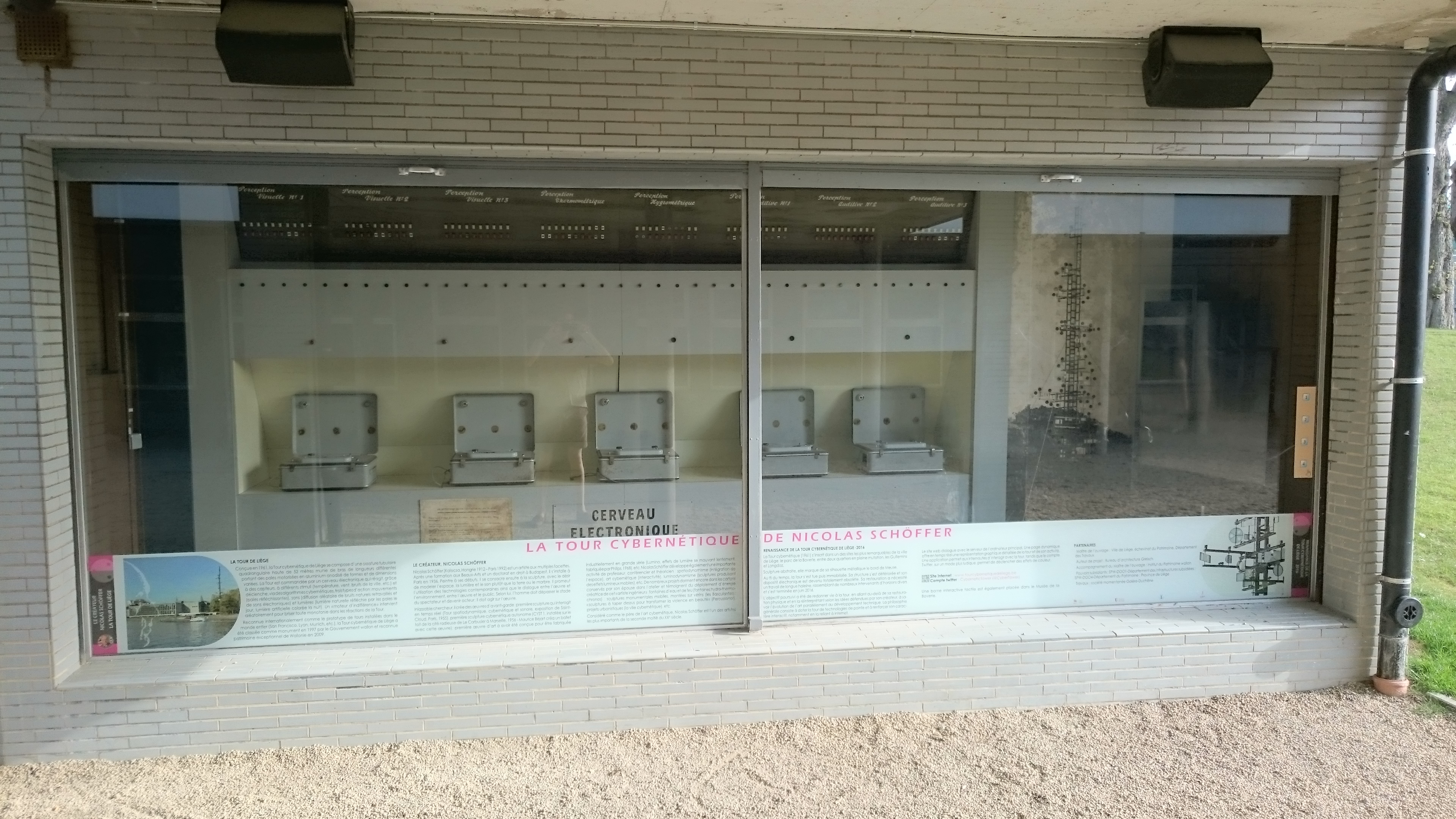 Cerveau électronique original de la Tour cybernétique de Liège, situé près du pied de la tour.